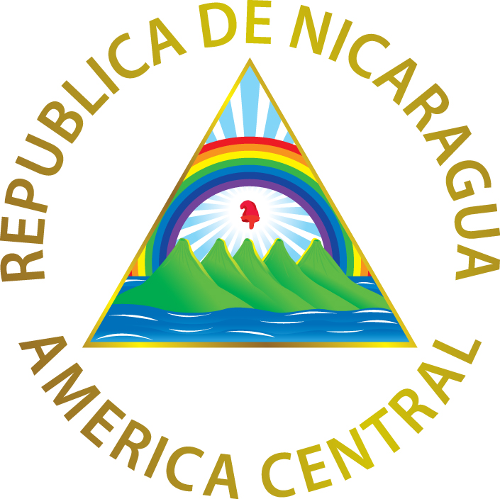 Escudo de Nicaragua diseñado conforme Decreto Legislativo No. 1908 de 1971